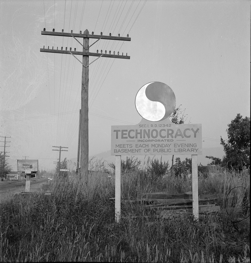 technocracy Sign